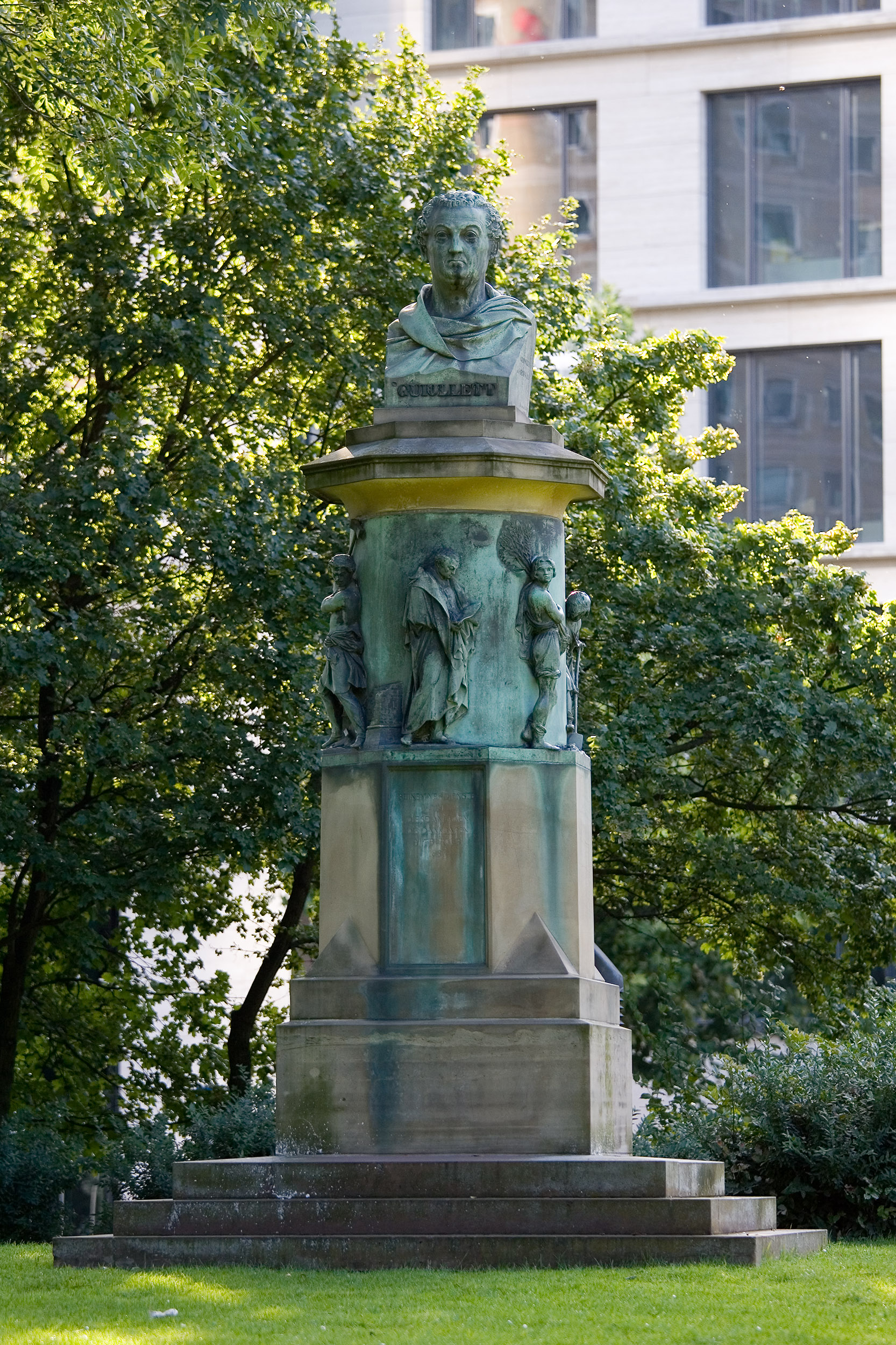 Denkmal von Jakob Guiollett in der Taunusanlage von Frankfurt am Main, geschaffen 1837 Eduard Schmidt von der Launitz.